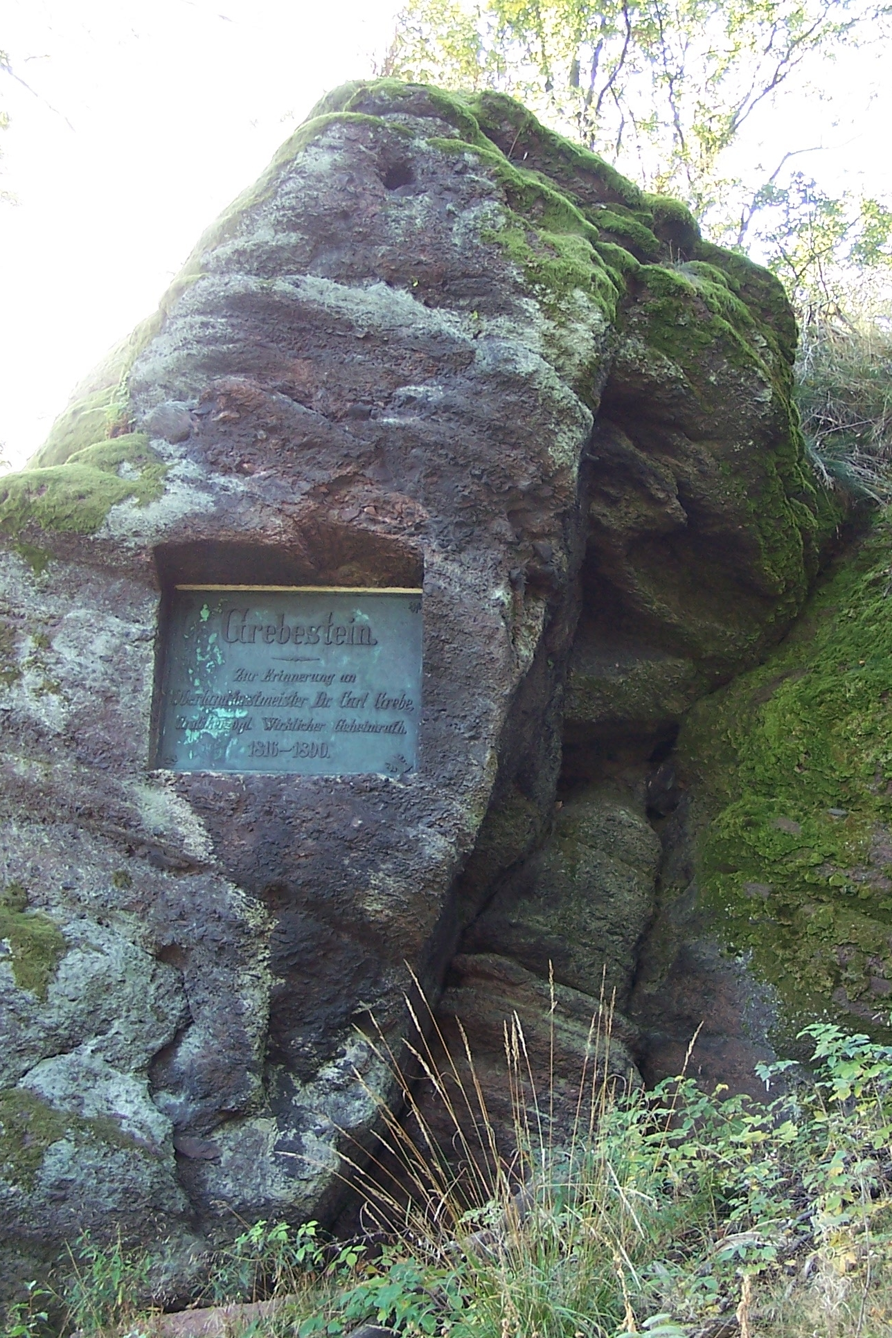 Gedenktafel für den Geh. Oberforstrat Carl Friedrich August Grebe (1816-1890) in Ruhla am Wachstein-Felsen.